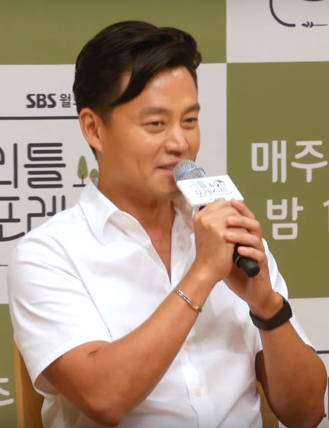 12일 오후 서울시 양천구 목동 SBS에서 SBS 월화 예능 ‘리틀 포레스트’ 제작발표회가 열려 배우 이승기, 이서진, 정소민, 개그우먼 박나래가 참석해 기자와의 질의 응답시간을 갖고 있다.